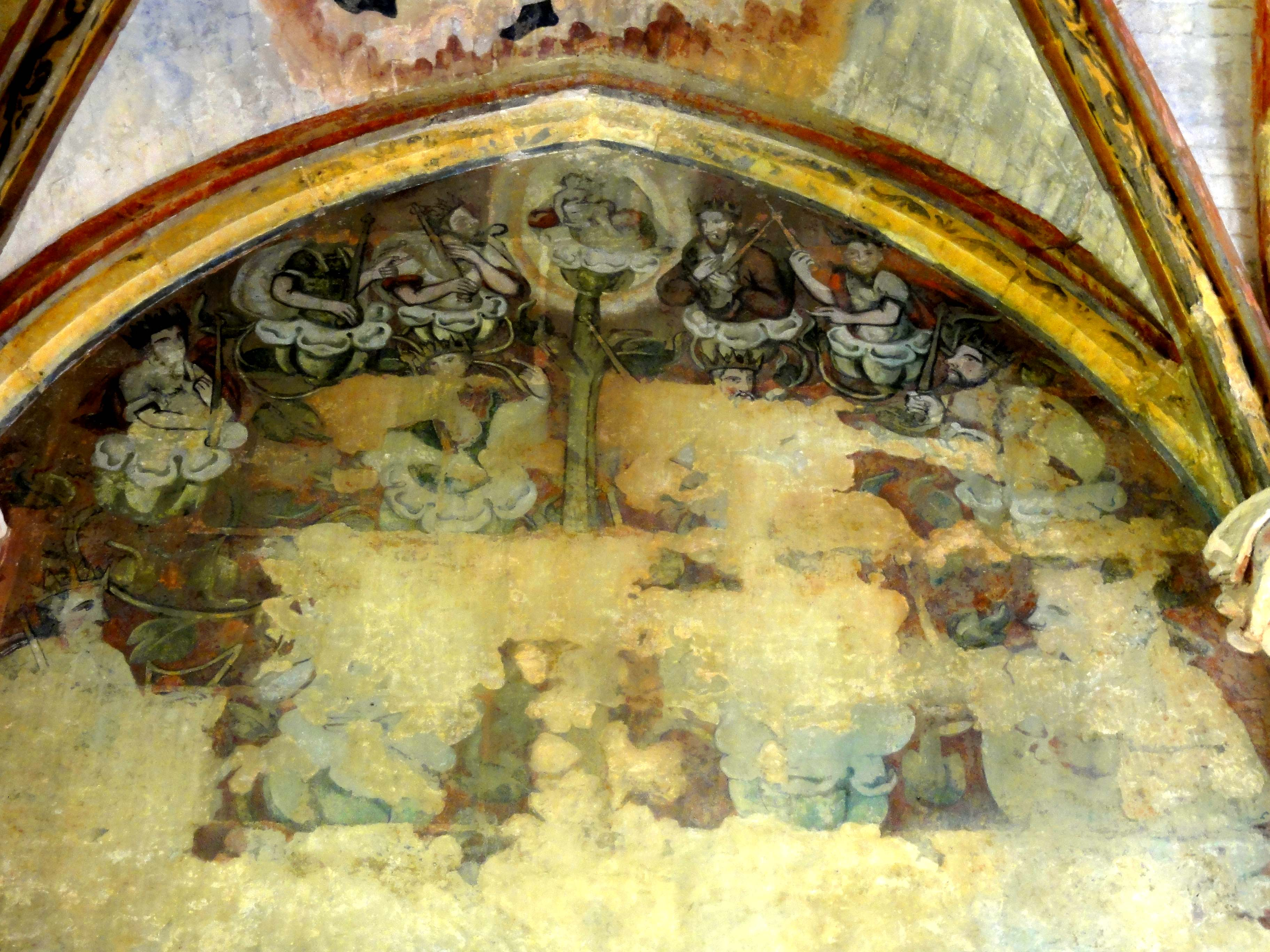 Chapelle de la Charité, peintures murales côté est.